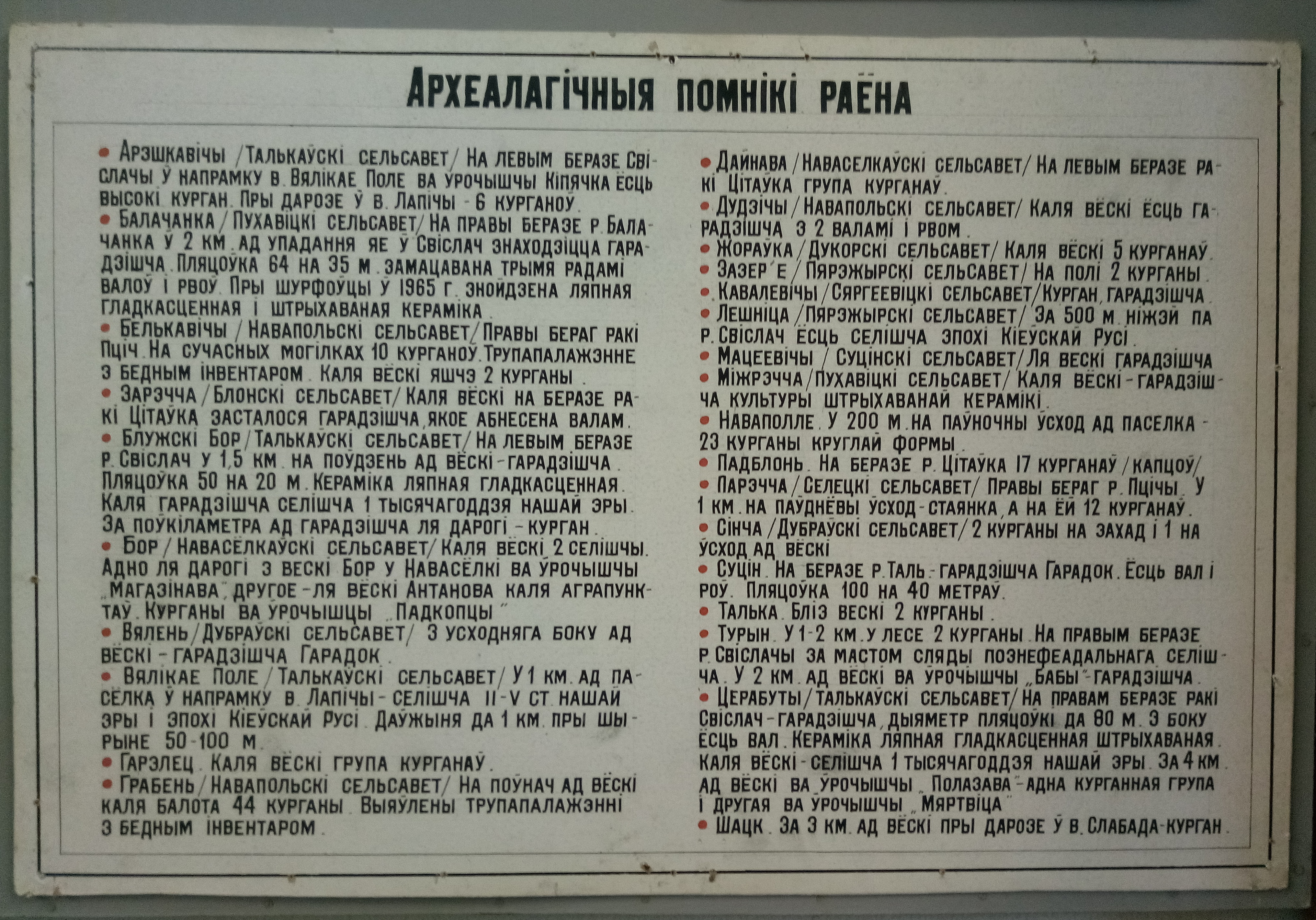 Пухавіцкі раённы краязнаўчы музей. Археалагічныя аб’екты Пухавіцкага раёна.